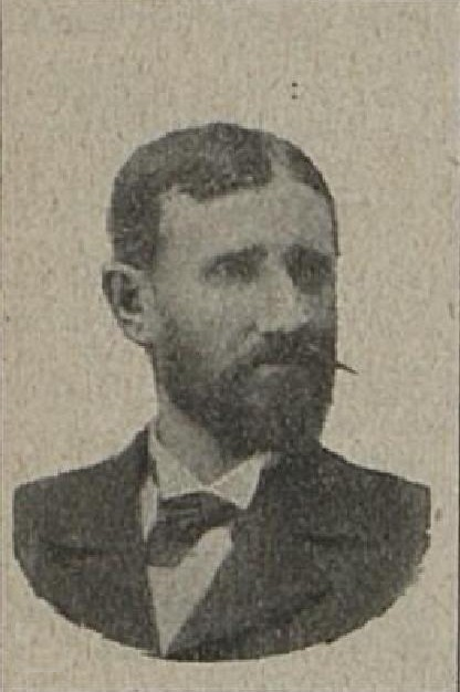 Josef Sýkora (1851-1920), rakouský politik z Moravy; poslanec Moravského zemského sněmu